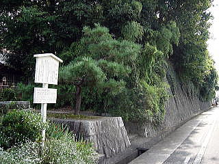 島田城